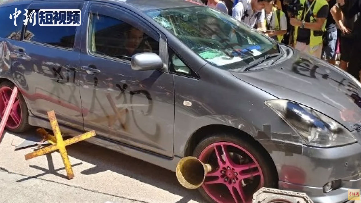 香港司机遭示威者暴力围堵 强行冲出